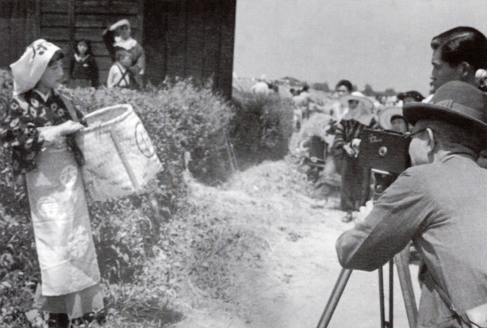 西尾茶のプロモーションの撮影現場。1933～34年頃。現在の西尾市上町。